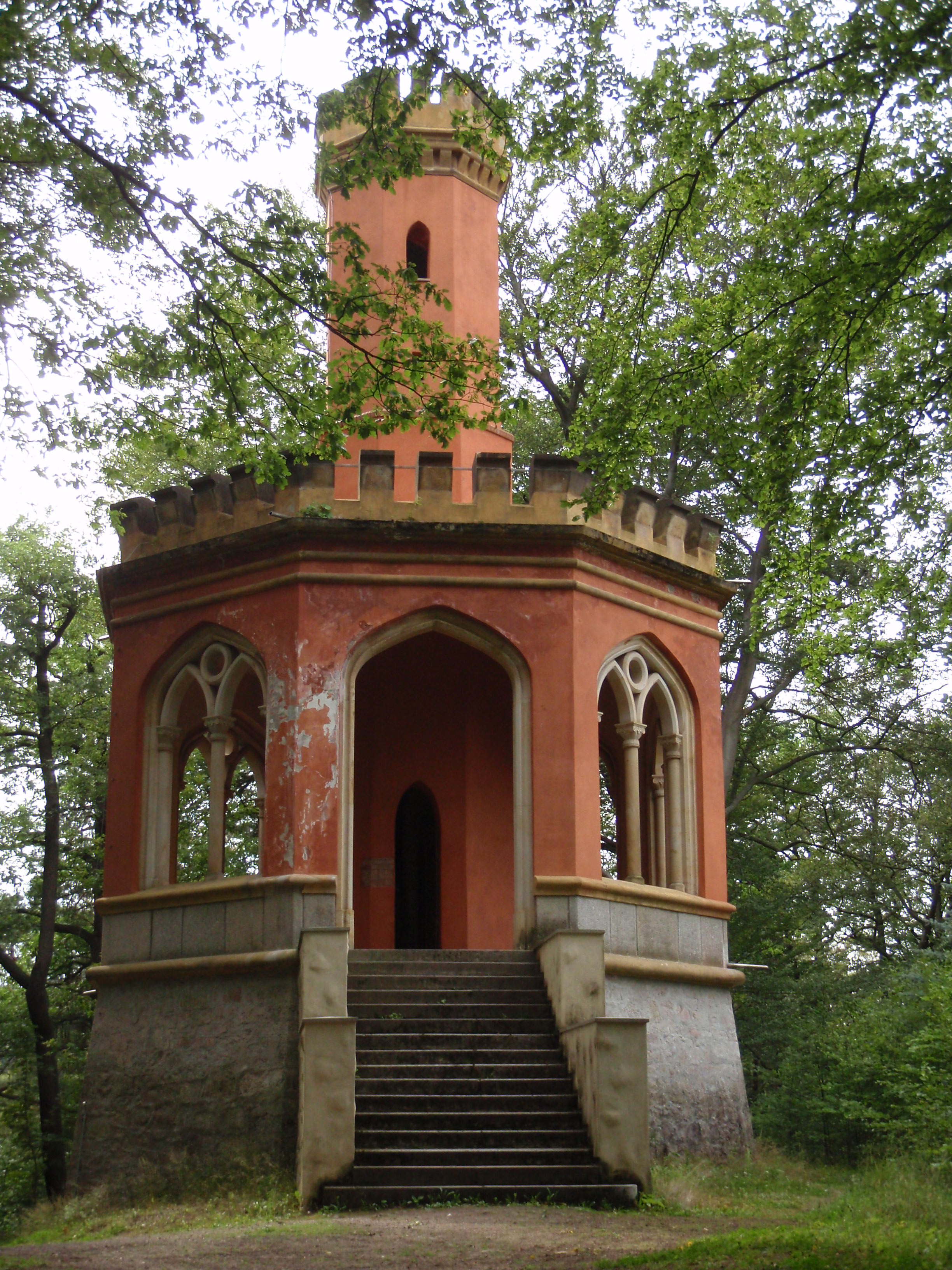 Vyhlídka Karla IV. (pohled na průčelí vchodu)